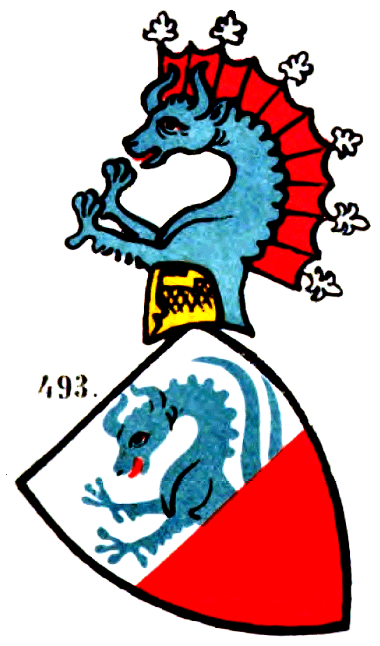 Stammwappen der Starchemberg